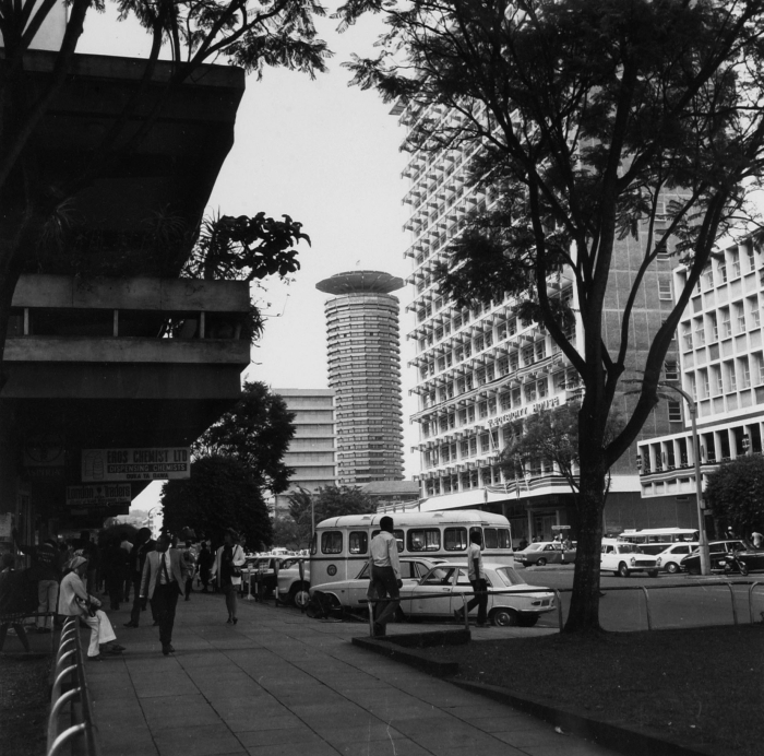 De gebouwen rechts zijn met vlaggen versierd ter gelegenheid van tien jaar onafhankelijkheid van Kenya.